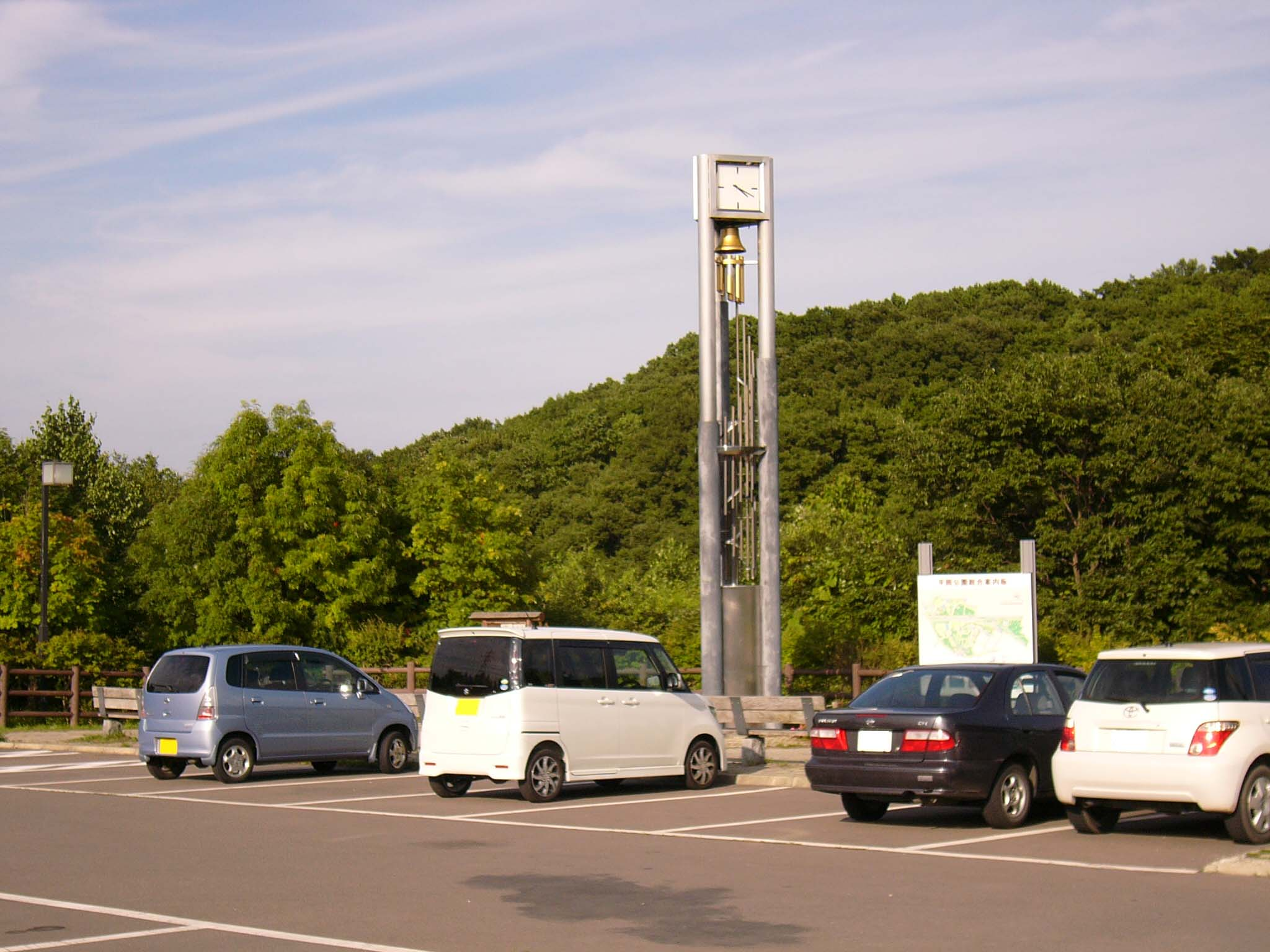 札幌市清田区平岡公園第一駐車場時計塔、駐車している車のナンバープレートはphotoshopにて加工。